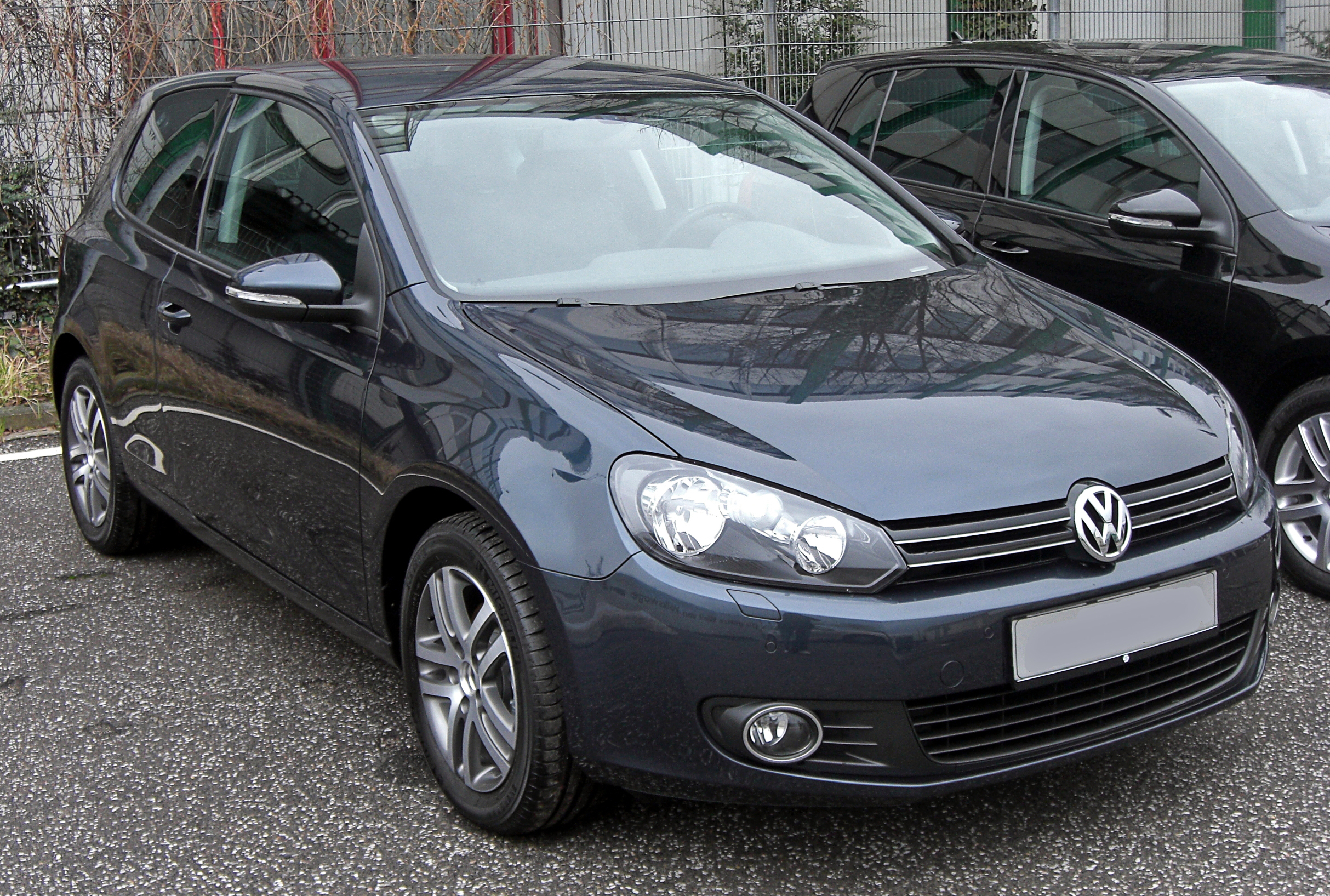 VW GOLF